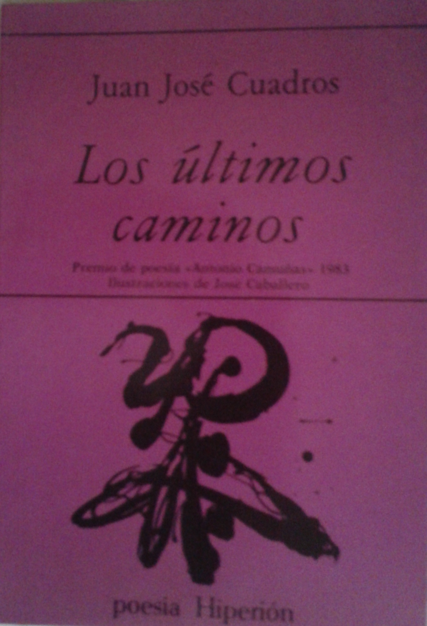 Los últimos caminos de Juan José Cuadros